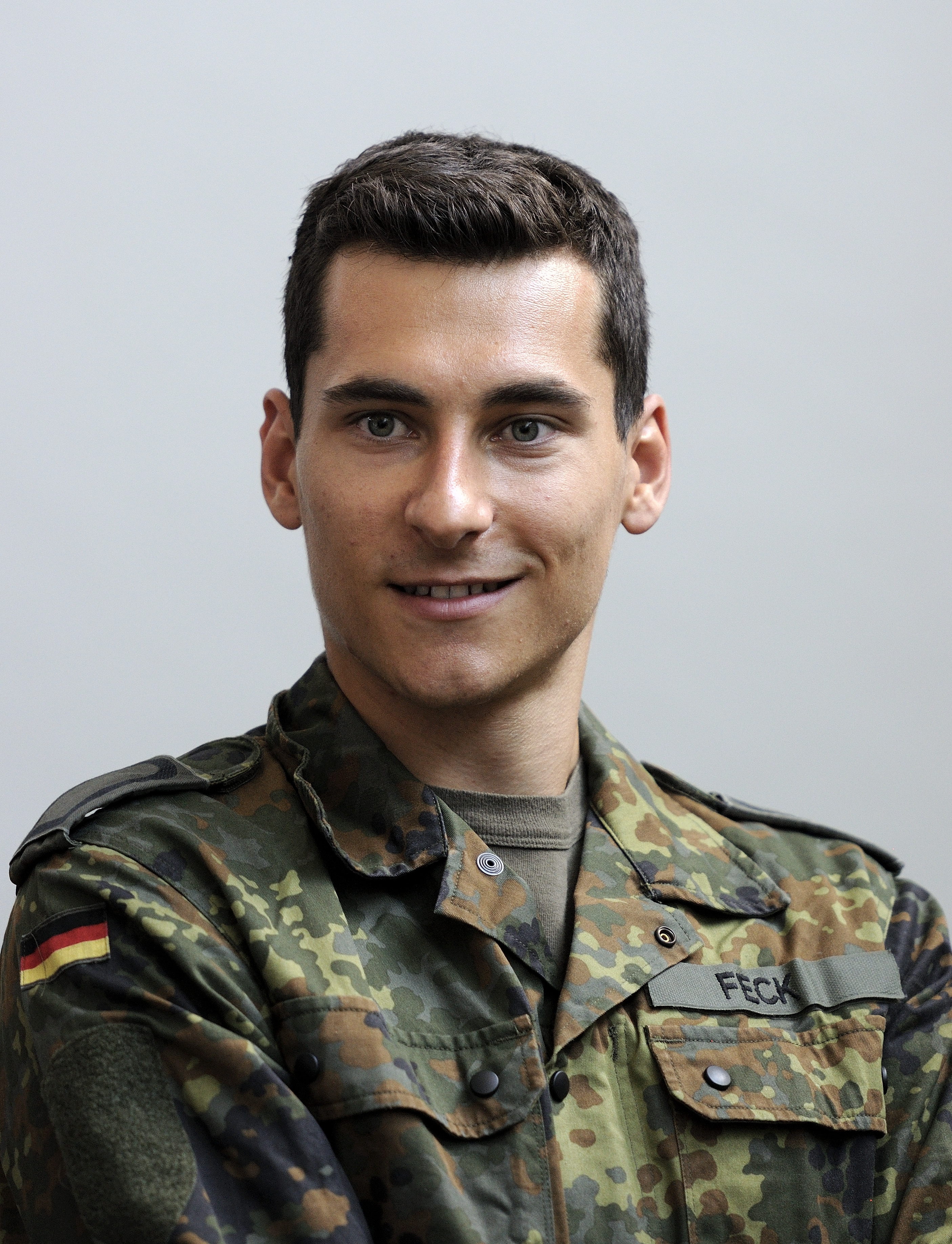 Bild aufgenommen in Hannover während der Einkleidung der deutschen Olympiamannschaft 2016. Stephan Feck.